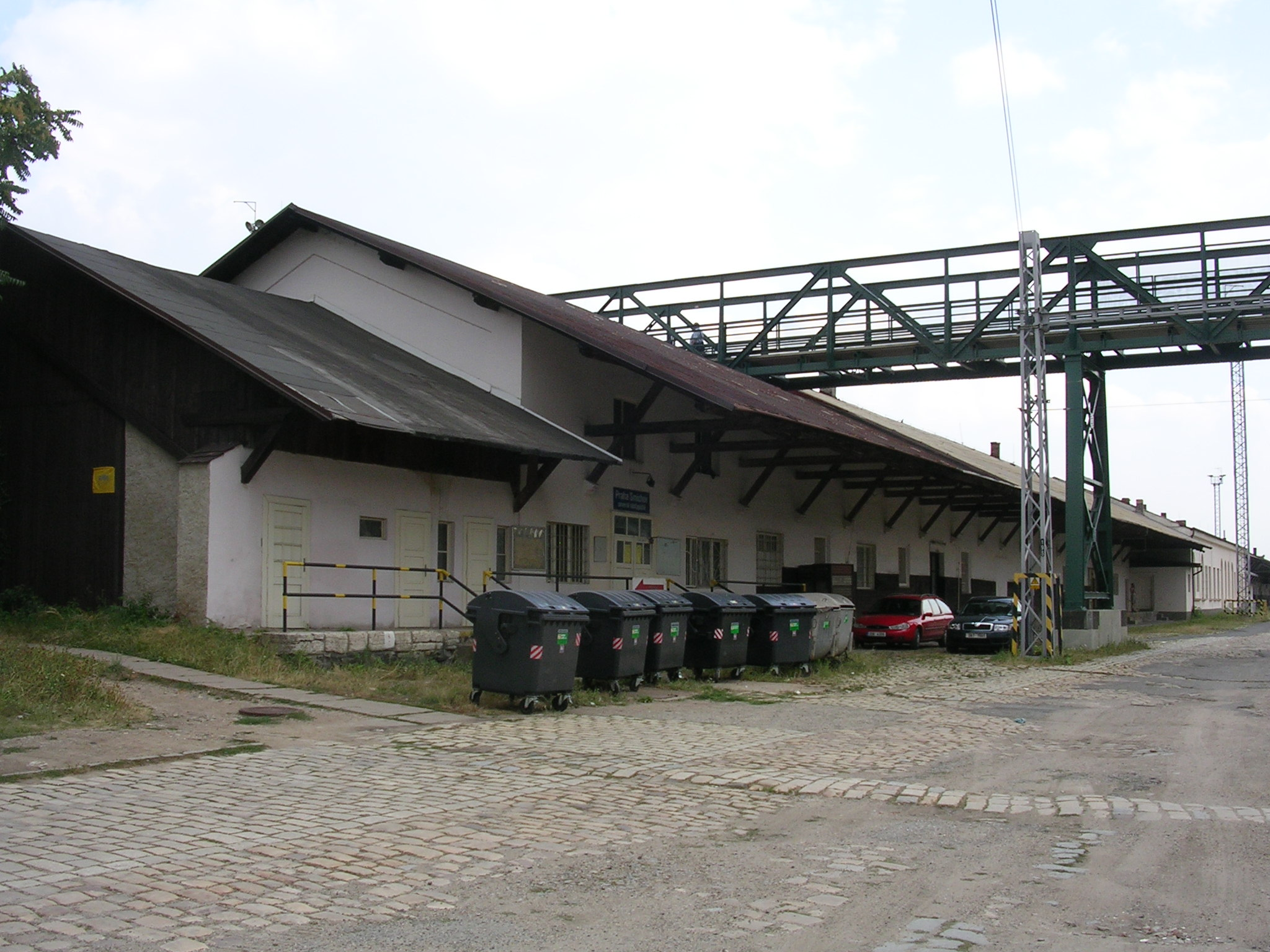 Praha, Smíchov, lávka přes Smíchovské nádraží, průchod nad provozními budovami v polovině délky lávky. Praha-Smíchov severní nástupiště.